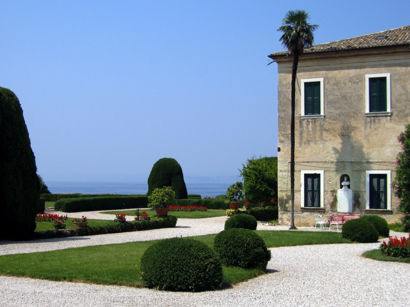 Villa Guarienti di Brenzone - Punta San Vigilio - Lago di Garda - Italia